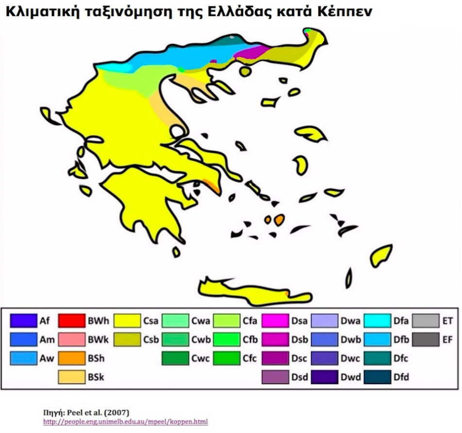 Κλιματική ταξινόμηση Κέππεν για την Ελλάδα